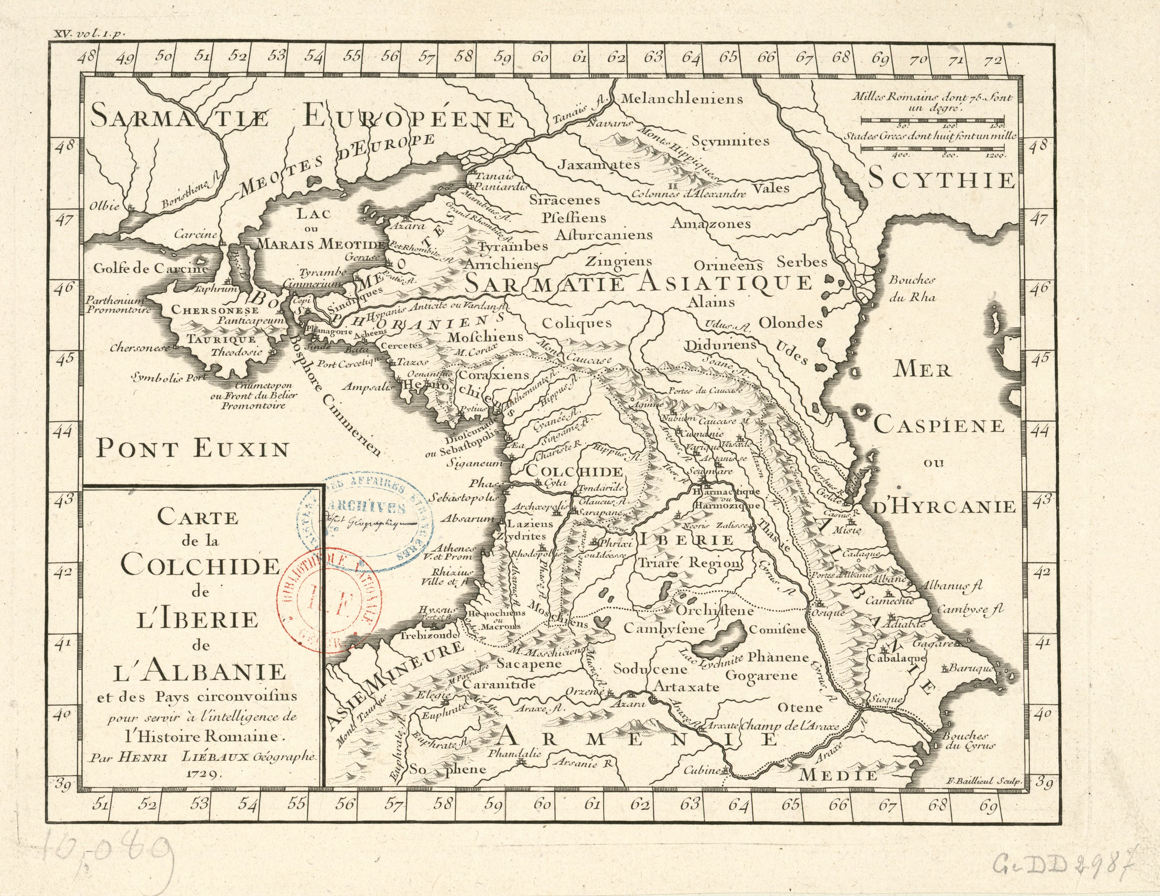 Carte de la Colchide, de l'Ibérie, de l'Albanie et des pays circonvoisins pour servir à l'intelligence de l'histoire romaine / par Henri Liébaux ; F. Baillieul sculp.